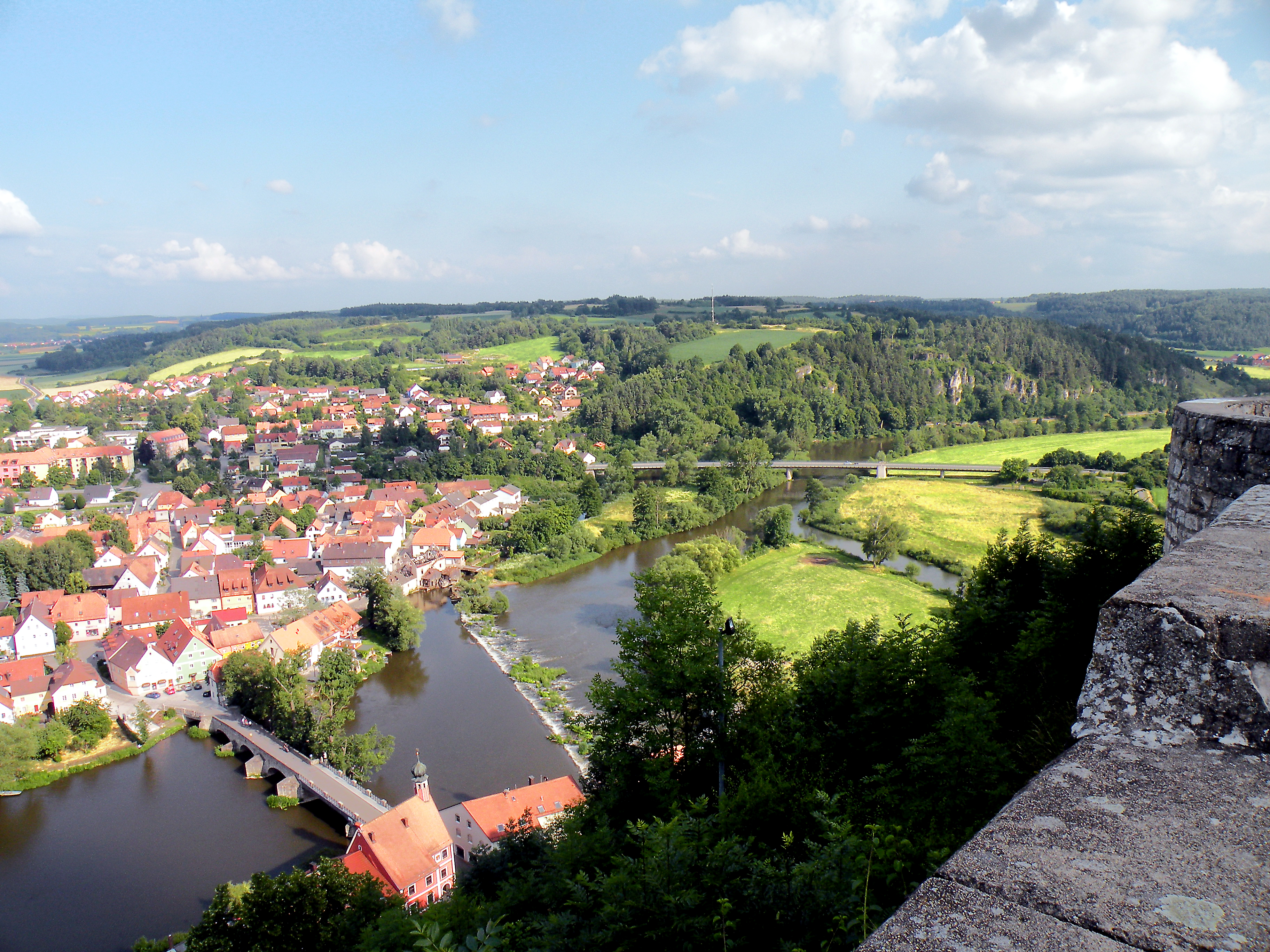 Оберпфальц.Кальмюнц.Вид на город от крепости.